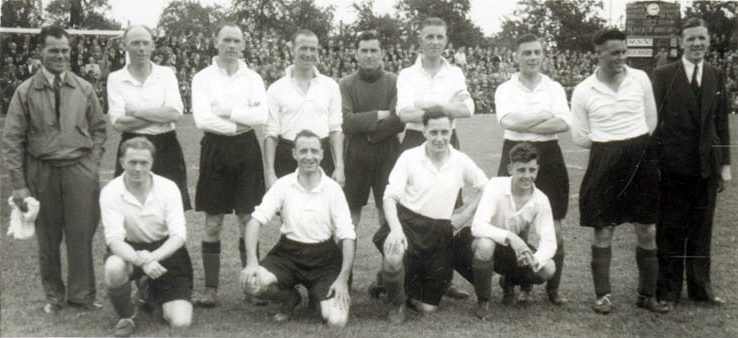 Het team van de Londense voetbalclub Woolwich (Charlton Athletic?), vóór de wedstrijd tegen MVV in Stadion De Boschpoort in Maastricht op 15 september 1945. De wedstrijd, die door MVV met 3-2 werd gewonnen, was onderdeel van het bevrijdingsfeest, één jaar na de bevrijding van Maastricht. Fotocollectie RHCL Maastricht, GAM 5677.